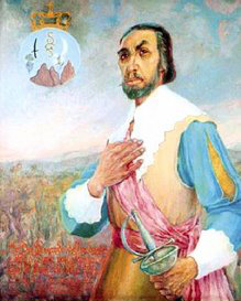 Fernando de Mendoza y Mate de Luna, conquistador español y fundador de la ciudad argentina de San Fernando del Valle de Catamarca, el 5 de julio de 1683. Fue gobernador del Tucumán entre 1681 y 1686. Óleo de Luis Varela Lezana del año 1977.